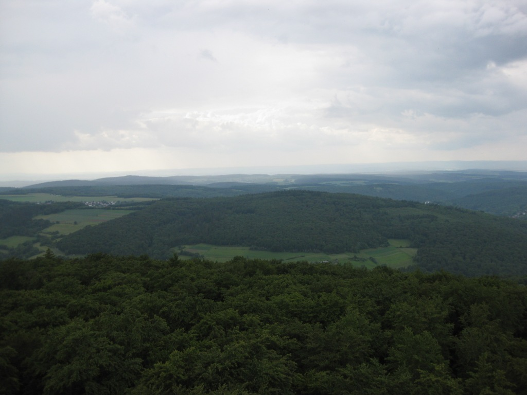 Wolfsküppel vom Pferdskopfturm